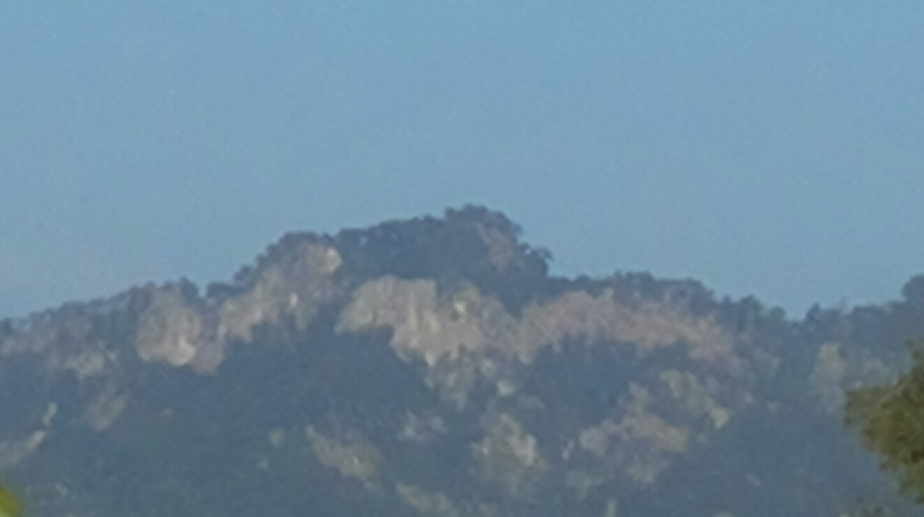 नेपाली: मैना चुलि